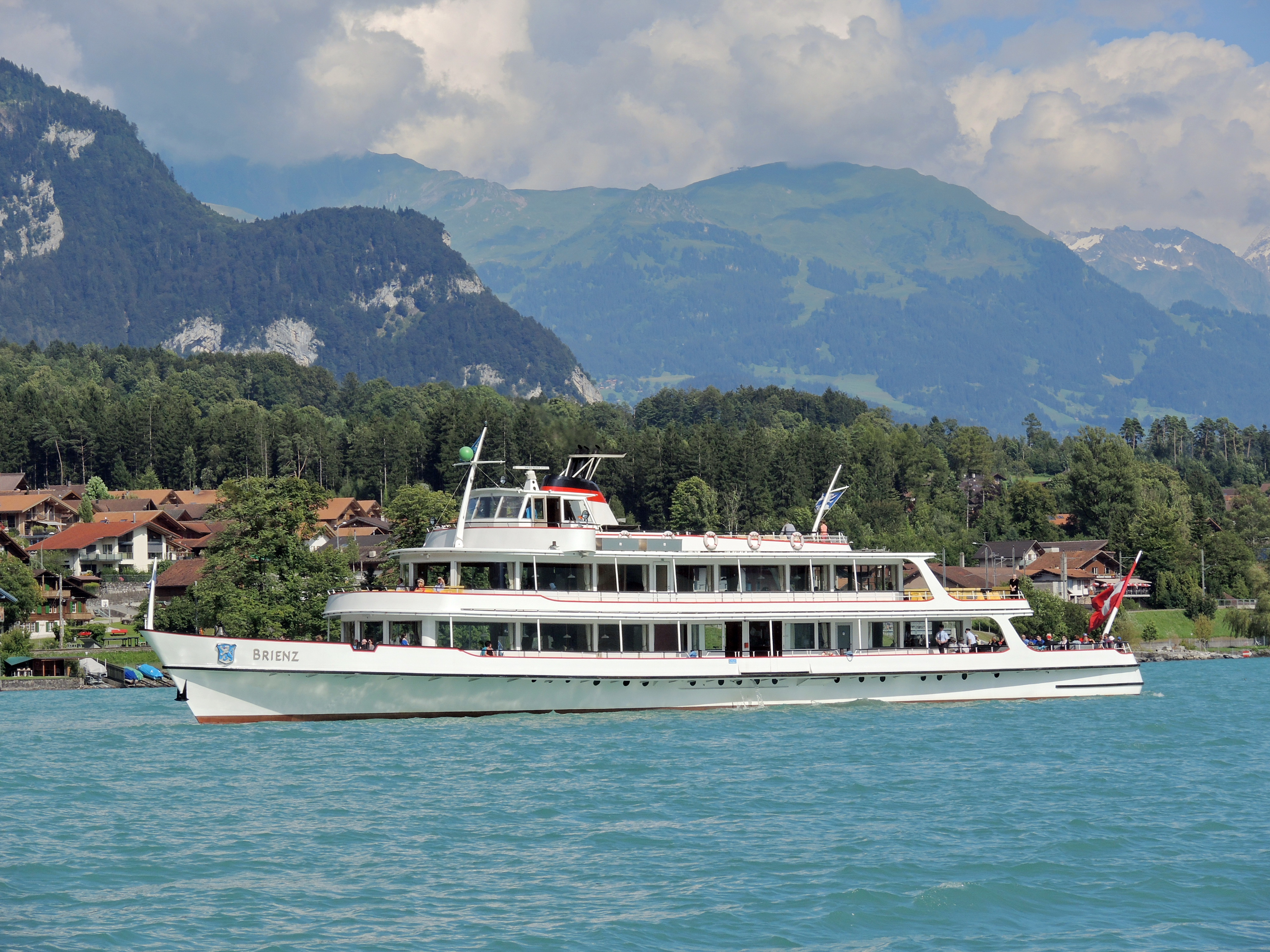 Brienz on Brienzersee lake shore in Switzerland